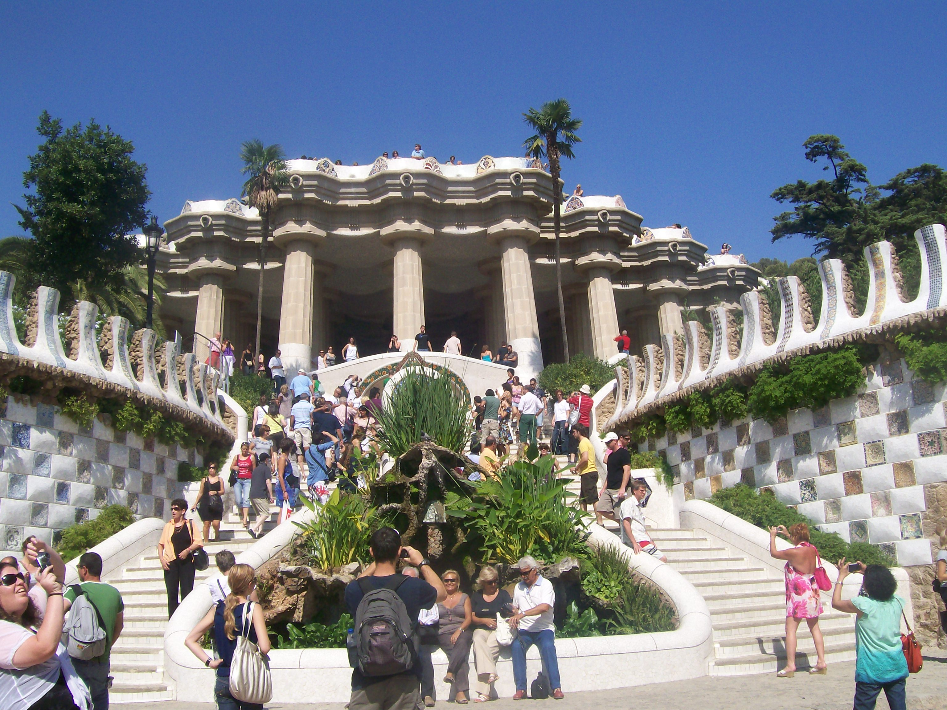 Park Guell